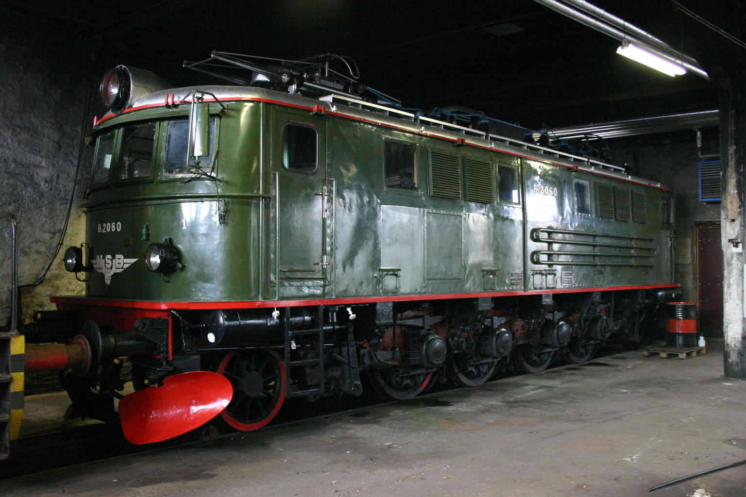 El-Lok El 8.2060 Hamar 02.08.04